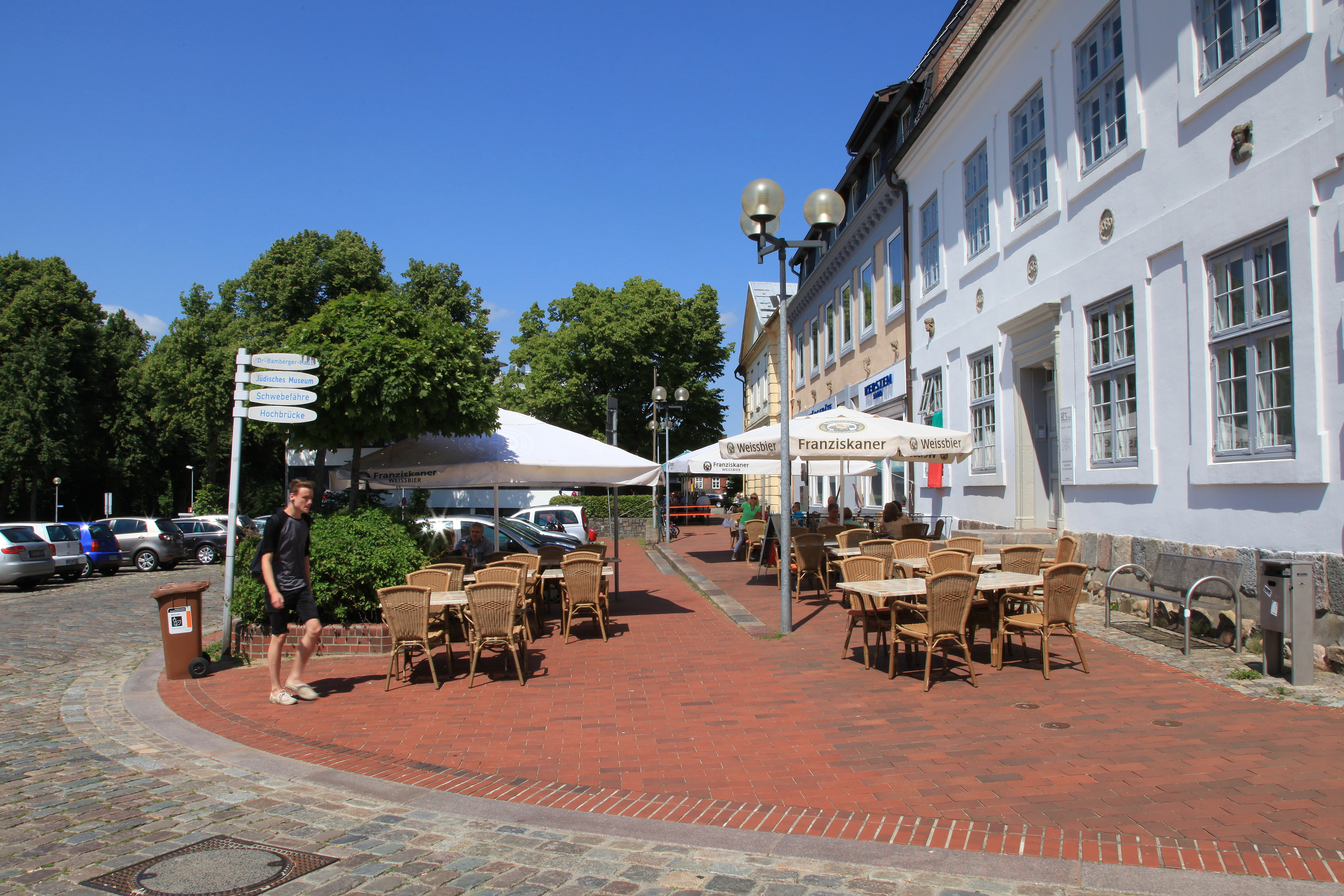 Paradeplatz 3 in Rendsburg